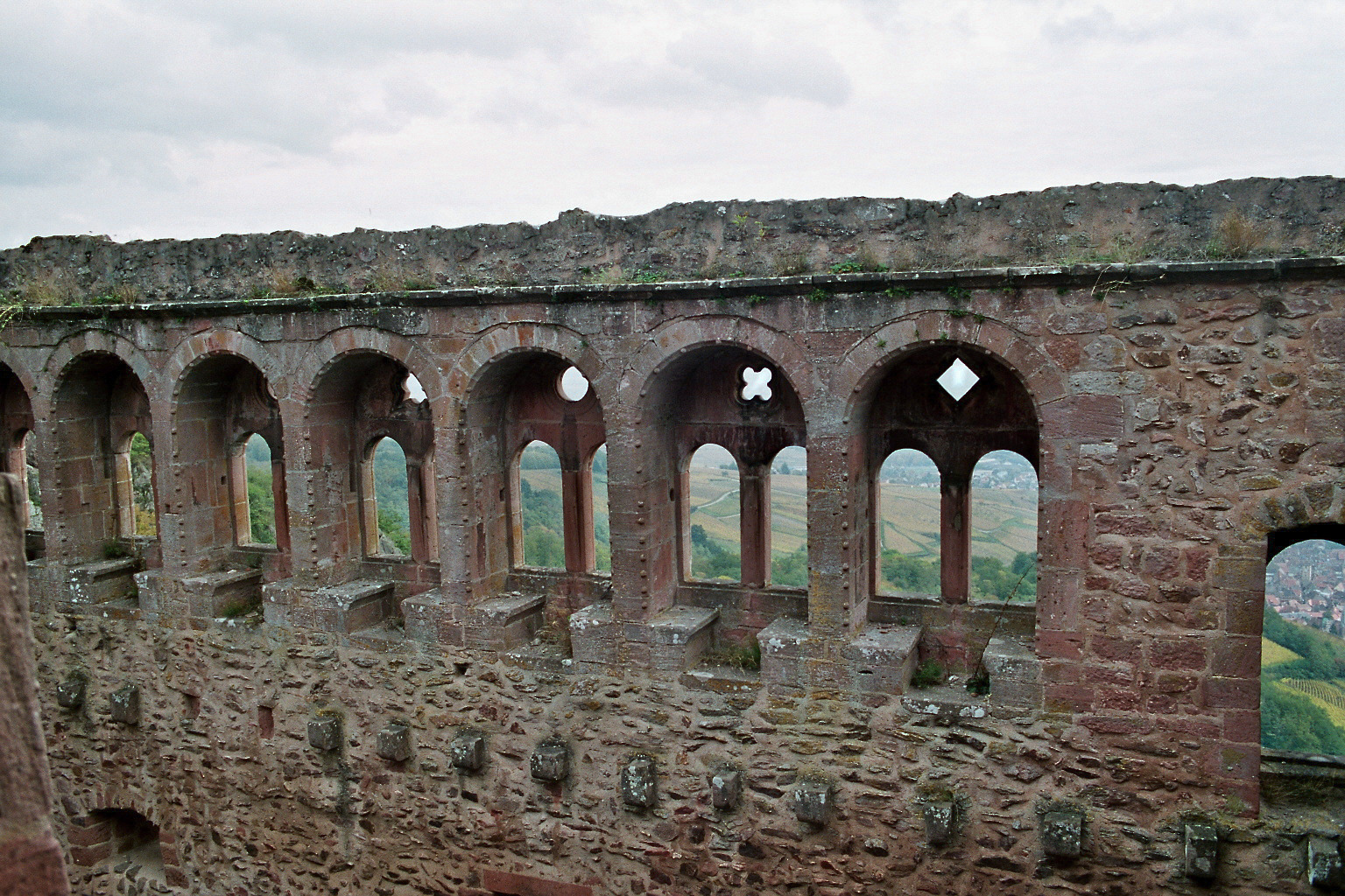 Château de Saint-Ulrich, près de Ribeauvillé, dans le Haut-Rhin : salle des chevaliers.